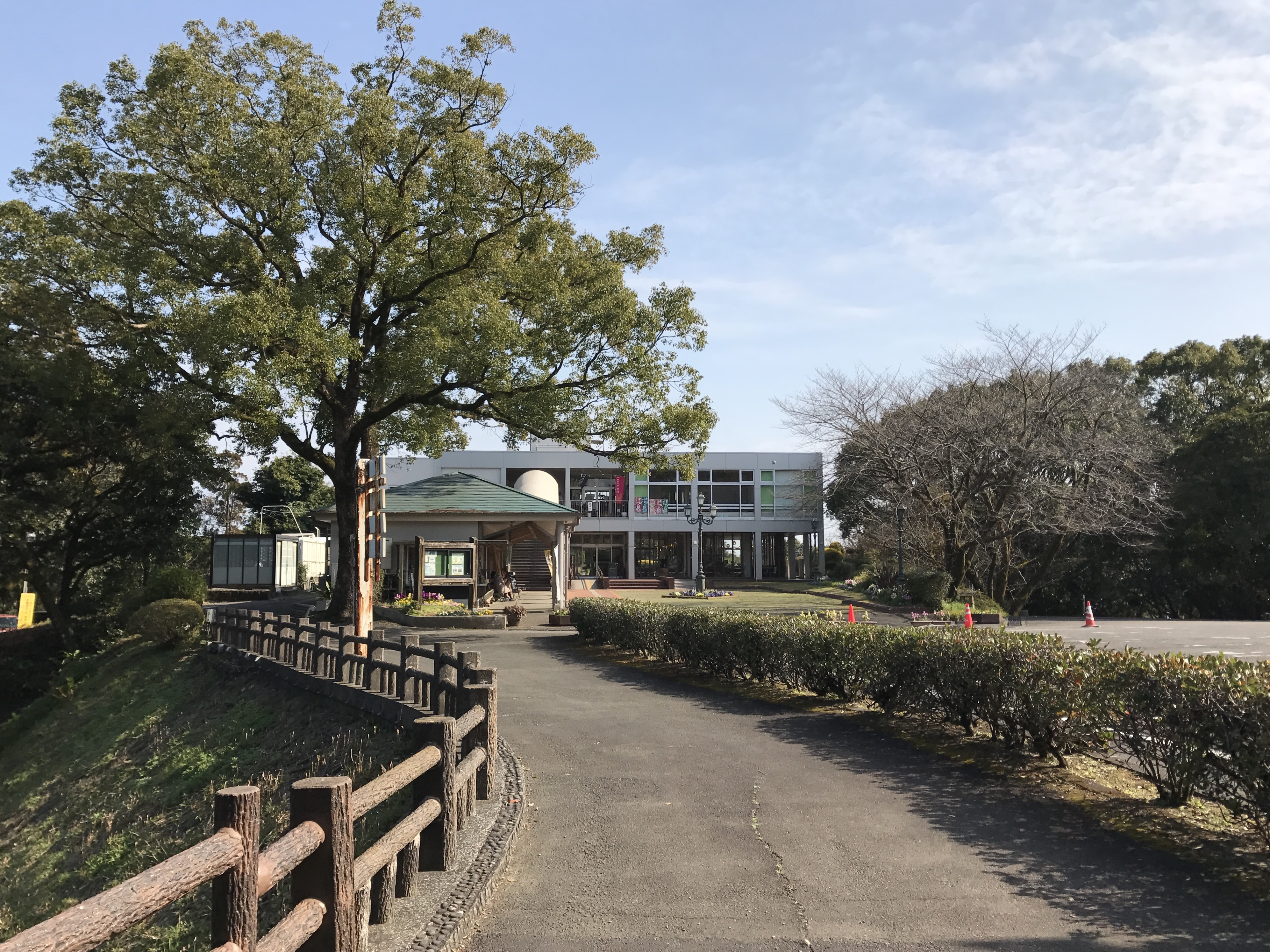 平和台公園レストハウス